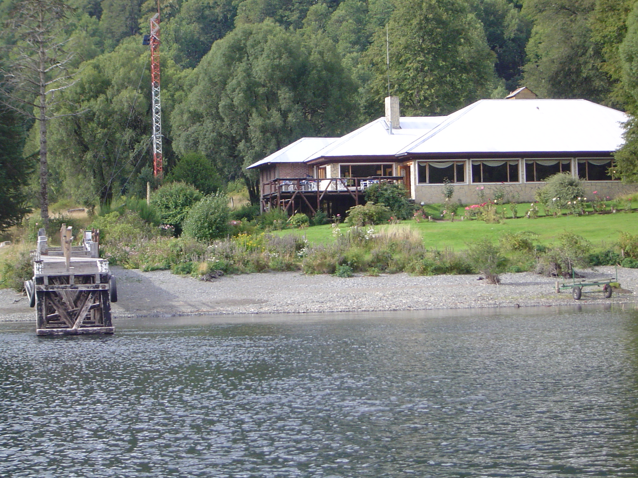 Muelle Paso Hua Hum, lago Nonthué (Cuenca Lácar)